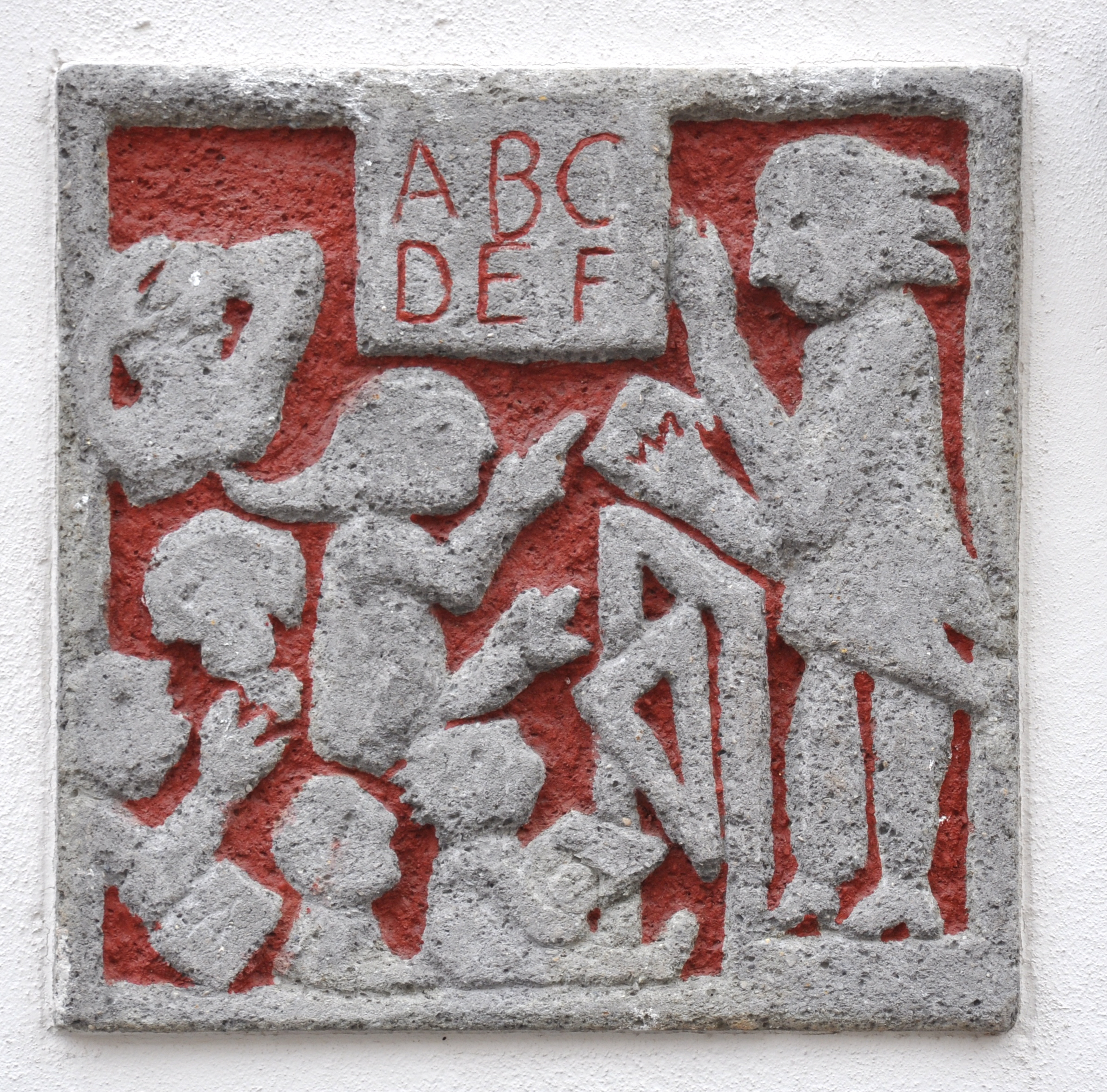 Münsingen, Alte Stadtschreiberei und Realschule, Relief